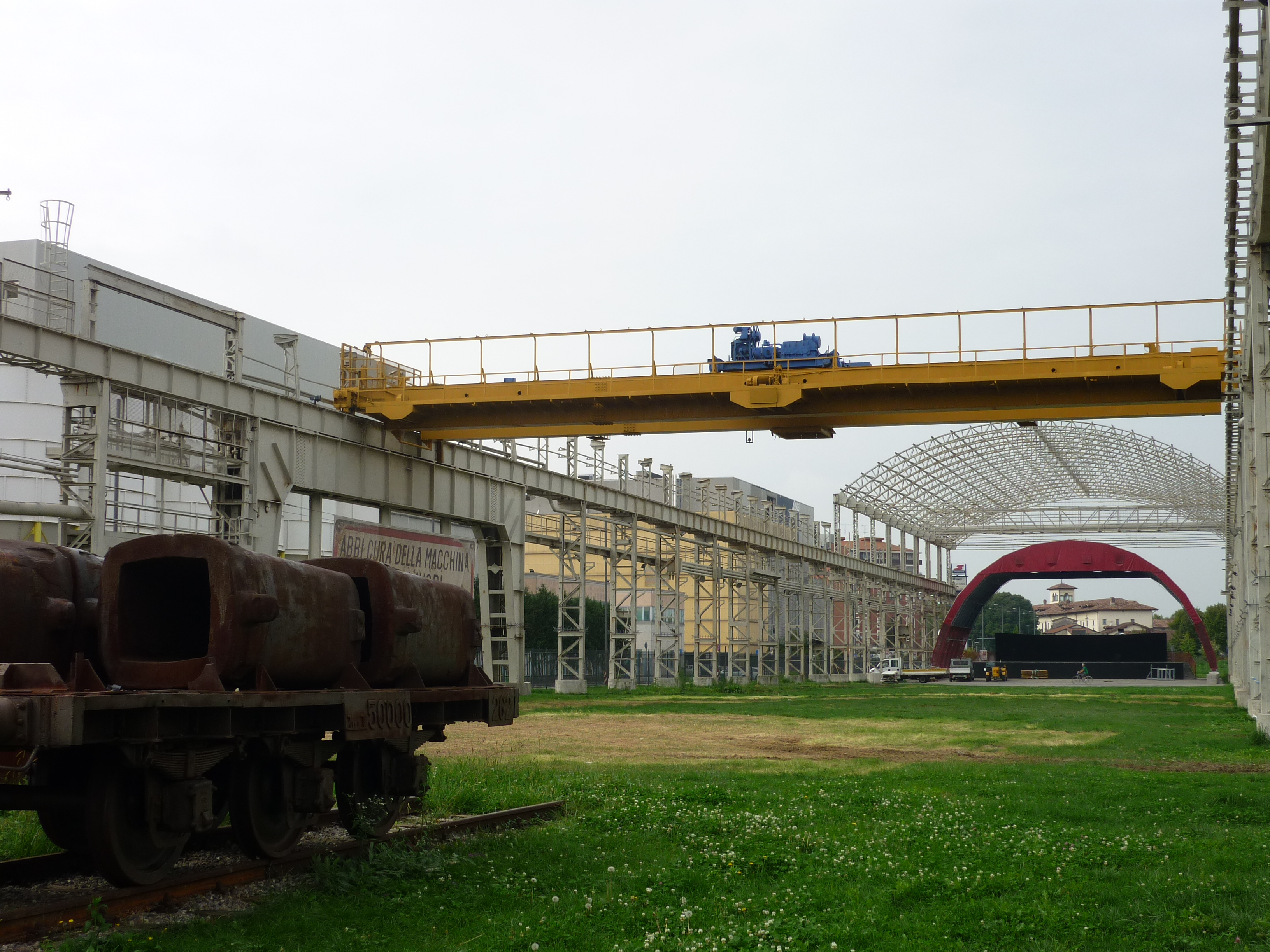 Carroponte con la locomotiva, il muro parlante e il carro lingottiera This is a photo of a monument which is part of cultural heritage of Italy.